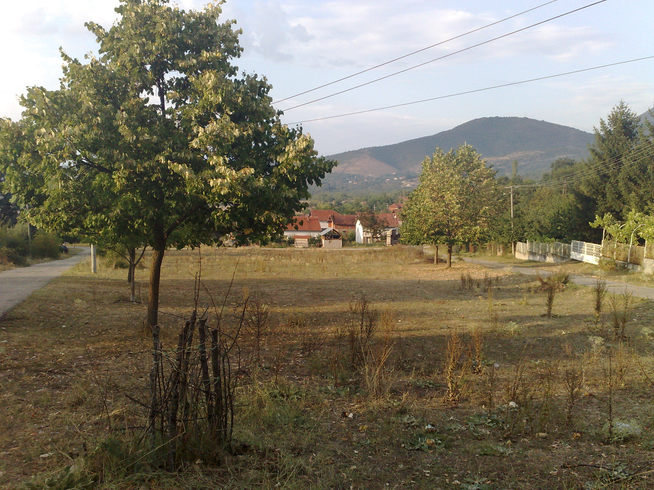 Село Волковија, Тетово